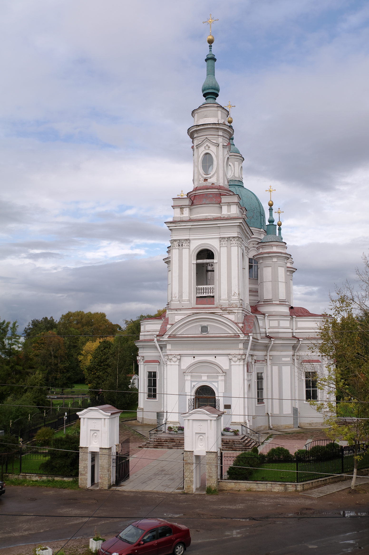 Екатерининский собор, г. Кингисепп, Ленинградская область